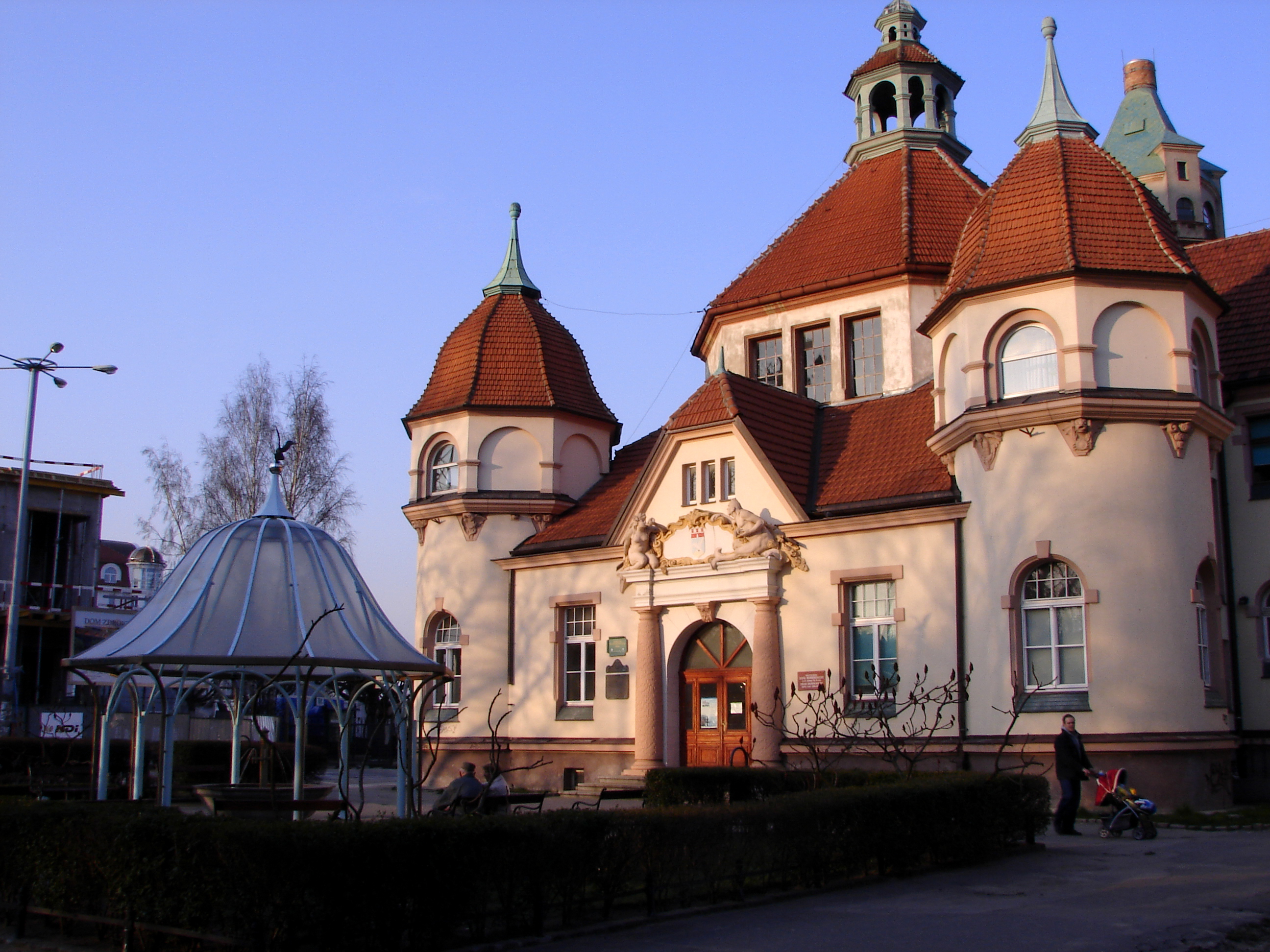 Sopot Dolny, pl. Zdrojowy - Zakład Balneologii, 1903-1904